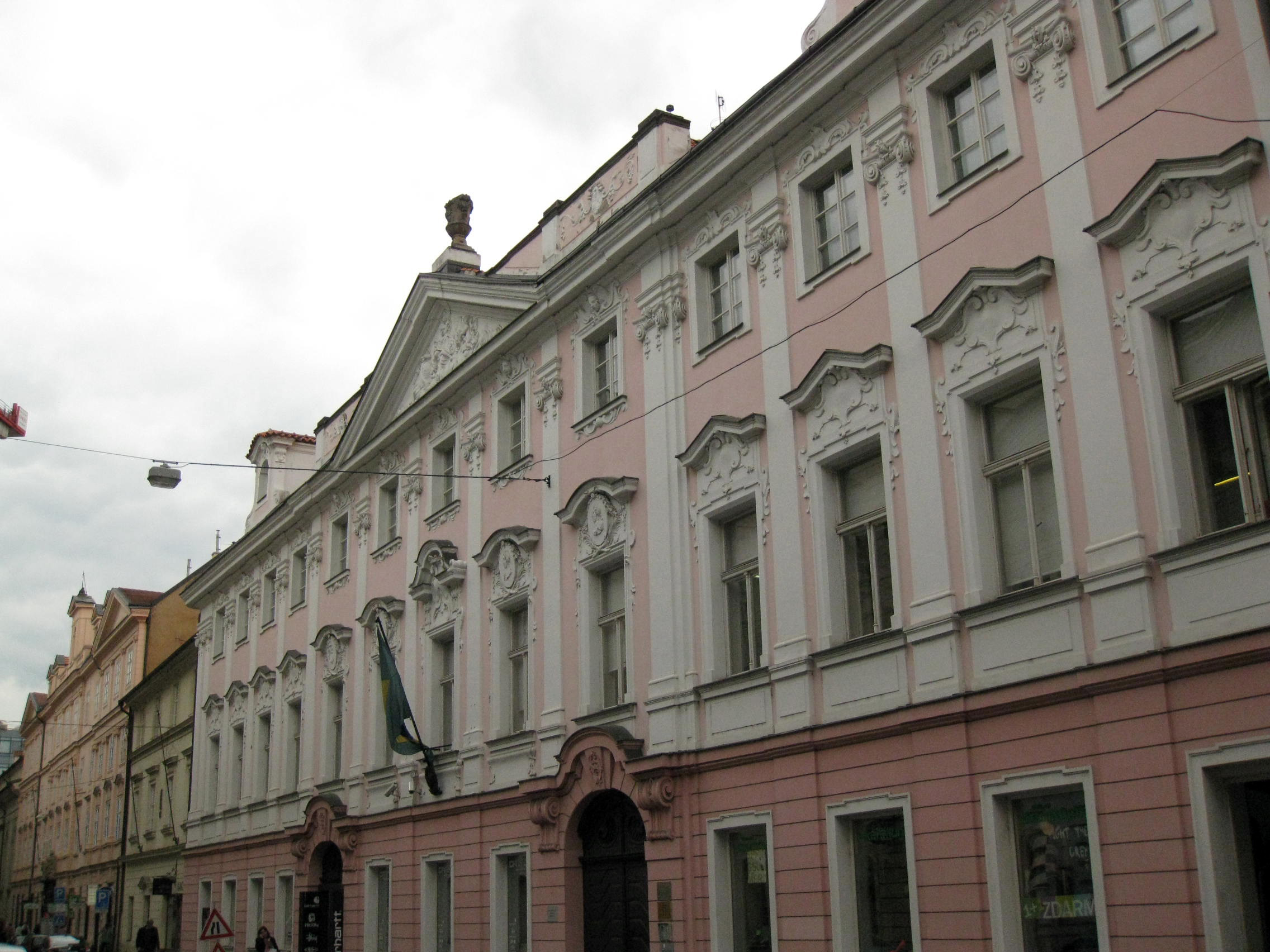 Palác Neubergů, Praha 1, Panská 891/5